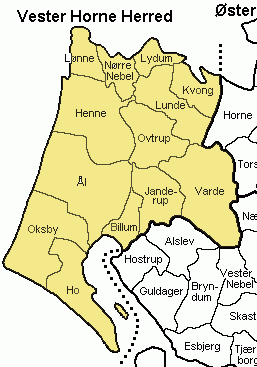 Vester Horne Herred Ribe Amt, Denmark Map by Svend-Erik Christiansen , edited by Nico-dk.